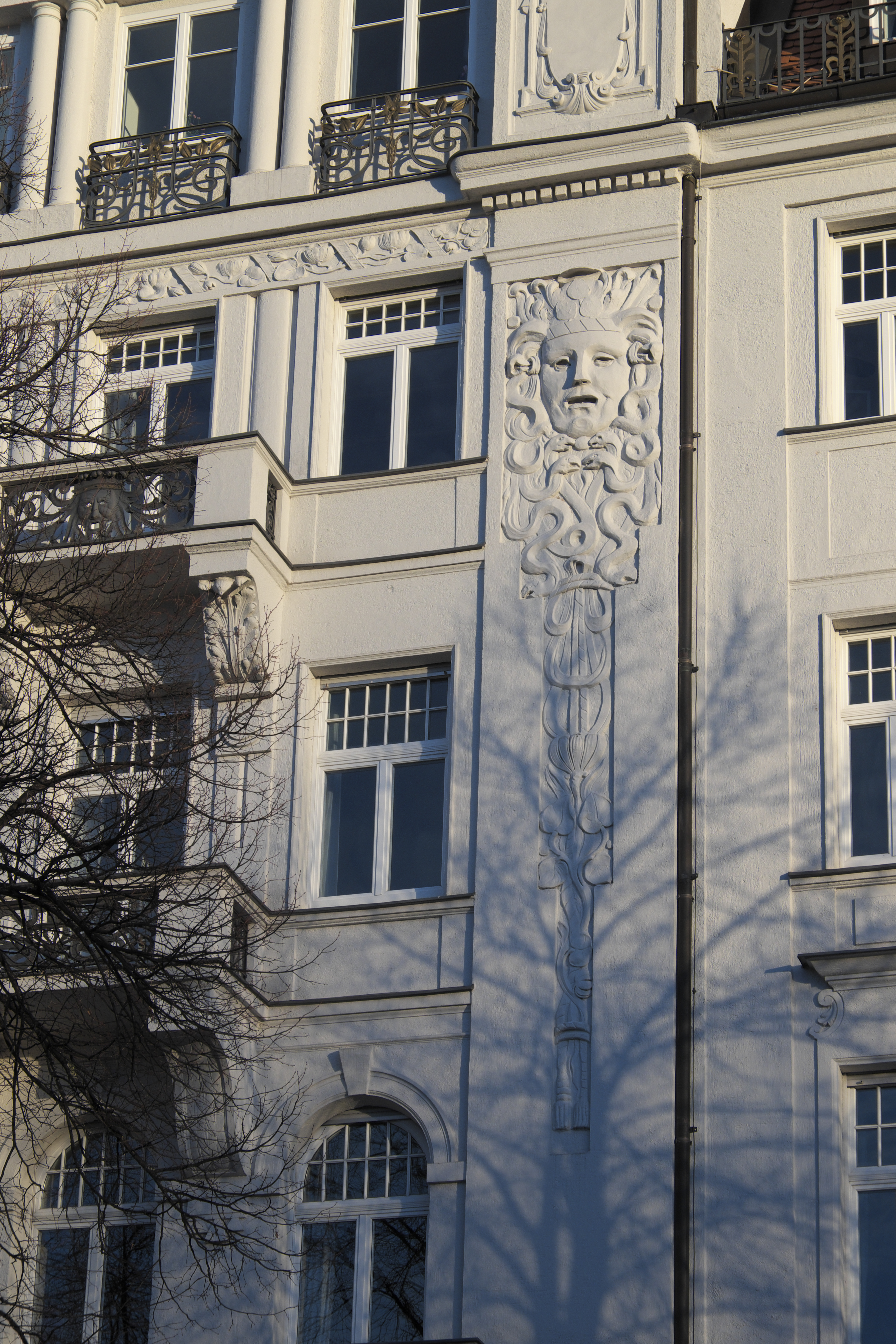 Mietshaus am Prinzregentenplatz 21/23 im Stadtbezirk Bogenhausen in München (Bayern/Deutschland), Nr. 21 1901 von Hans Hartl, Nr. 23 um 1900 wohl von Carl Vent erbaut